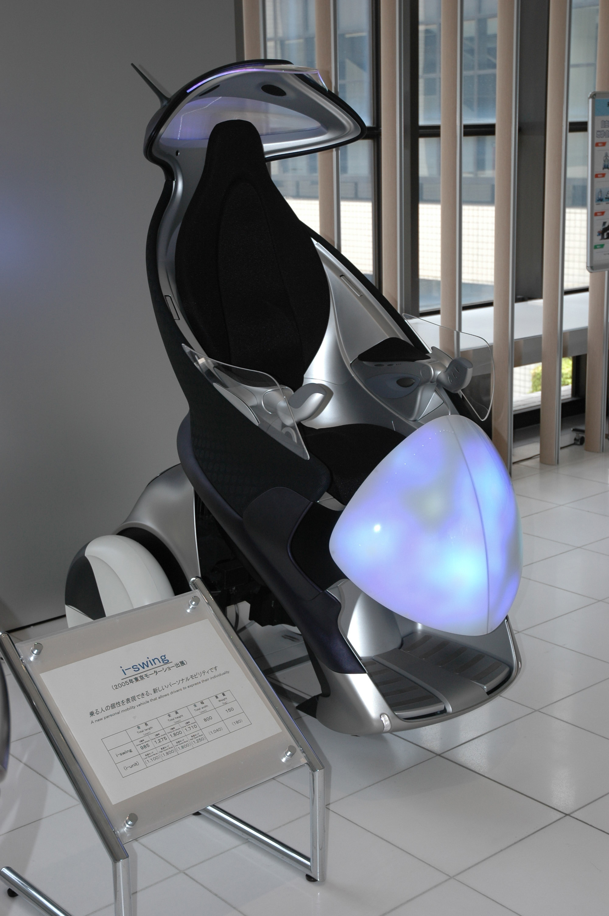 トヨタ会館で展示のi-swing